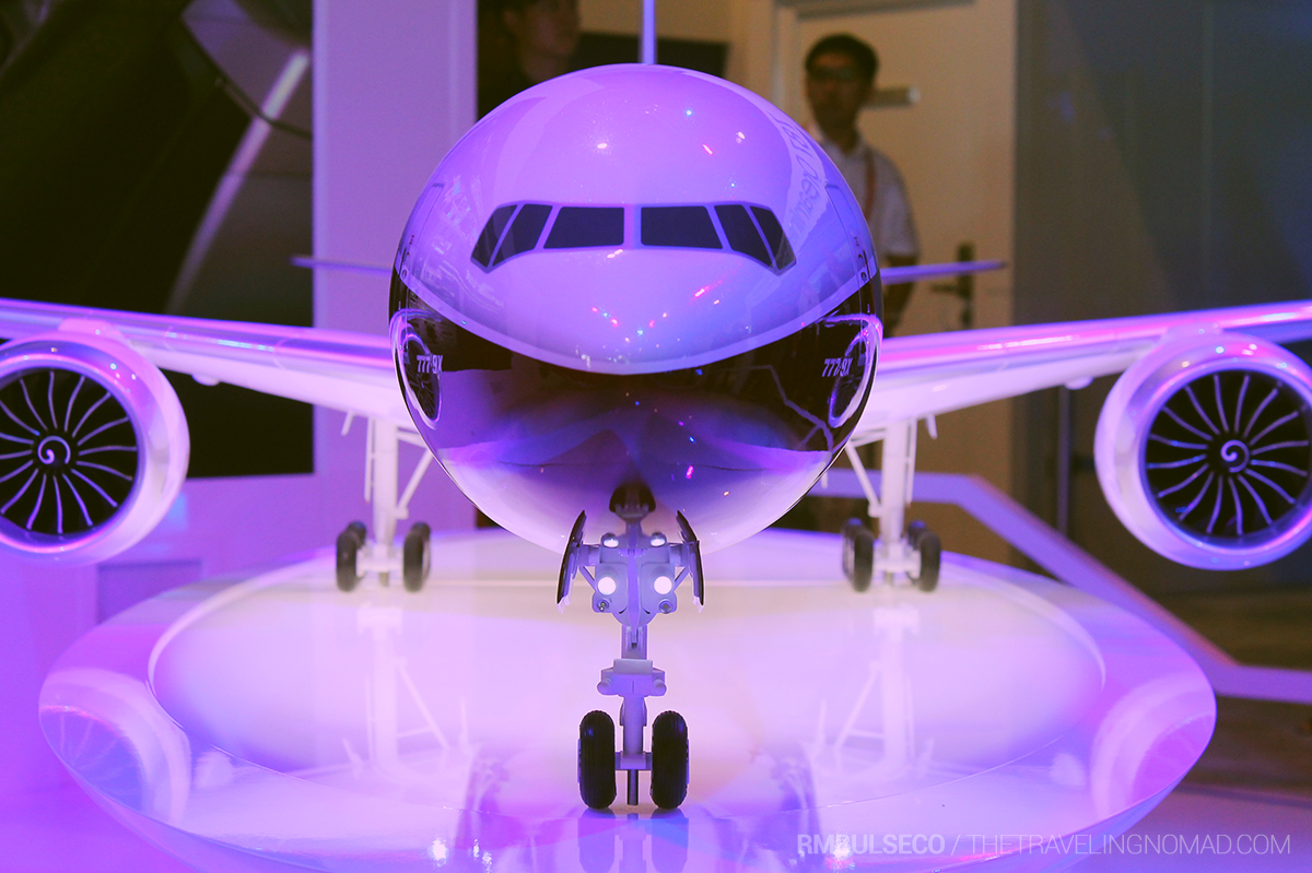 READ MORE